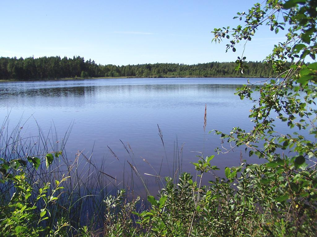 Vaskara ezers 2005-08-19